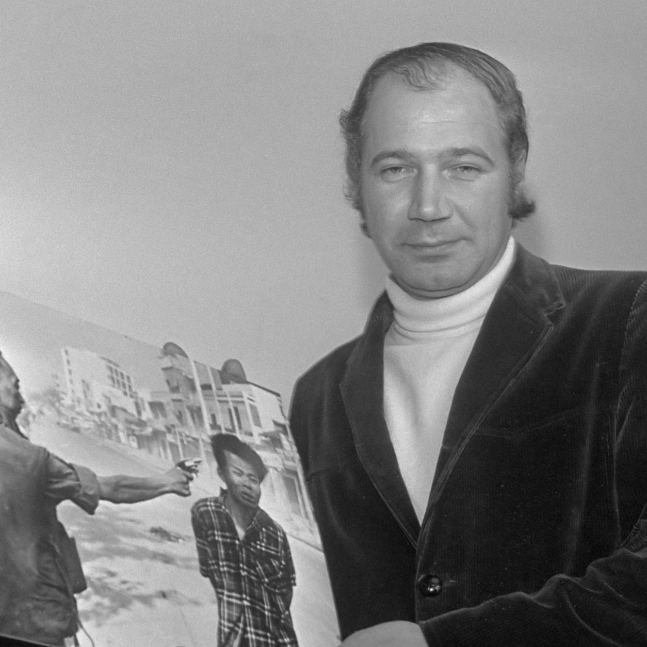 13e World Press Photo Edward T. Adams maakte beste persfoto P. van Breukelen (voorzitter World Press Photo) en Edward T. Adams (rechts) 14 maart 1969